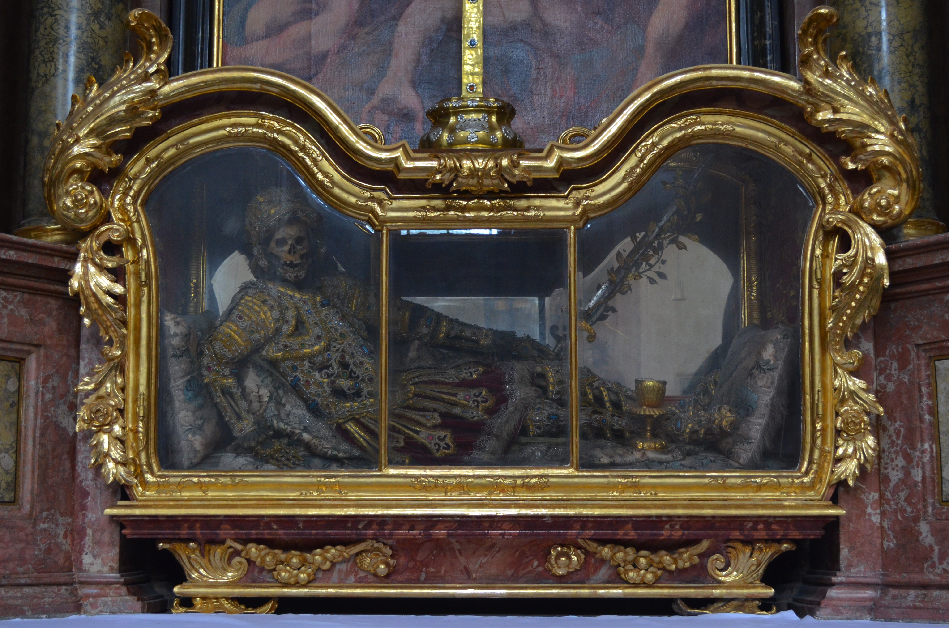 Waldsassen (Bavière-Allemagne - abbatiale (devenue basilique) de l'abbaye cistercienne. Saint Theodosius, soldat et martyr. Autel saint Michel.